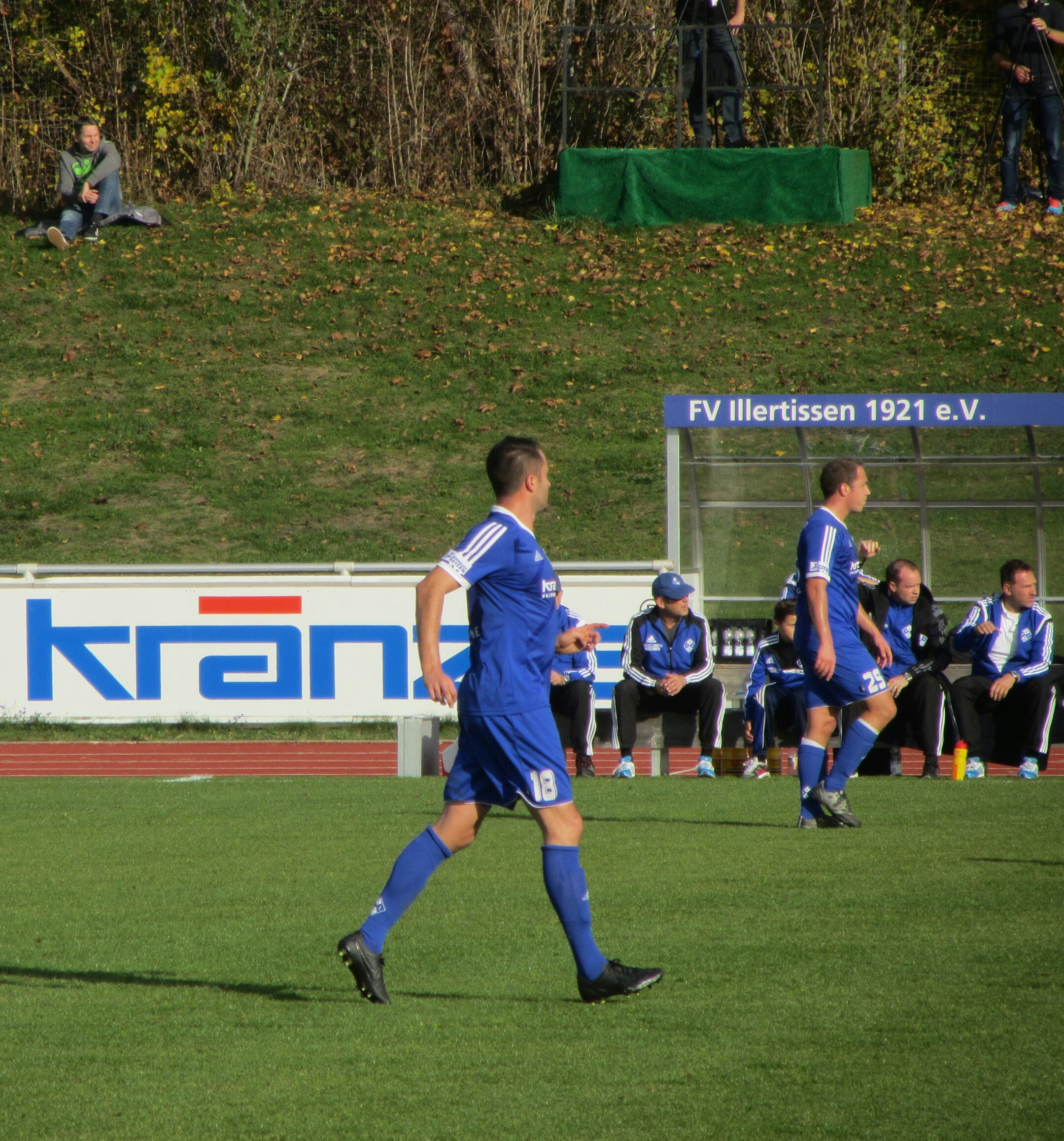 FV Illertissen